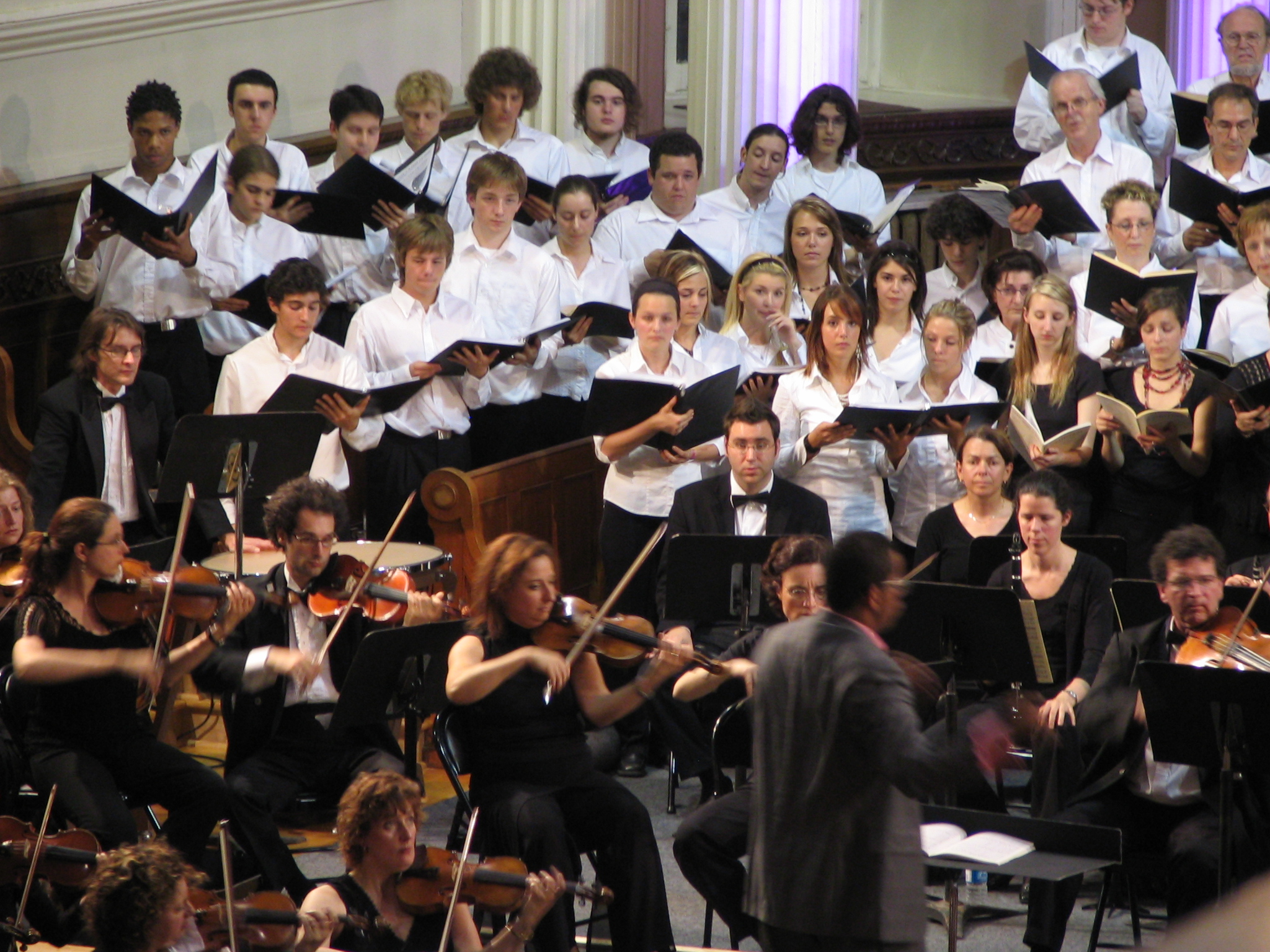 Concert d'ouverture 2006 du Mondial choral Loto-Québec, à Laval, Québec